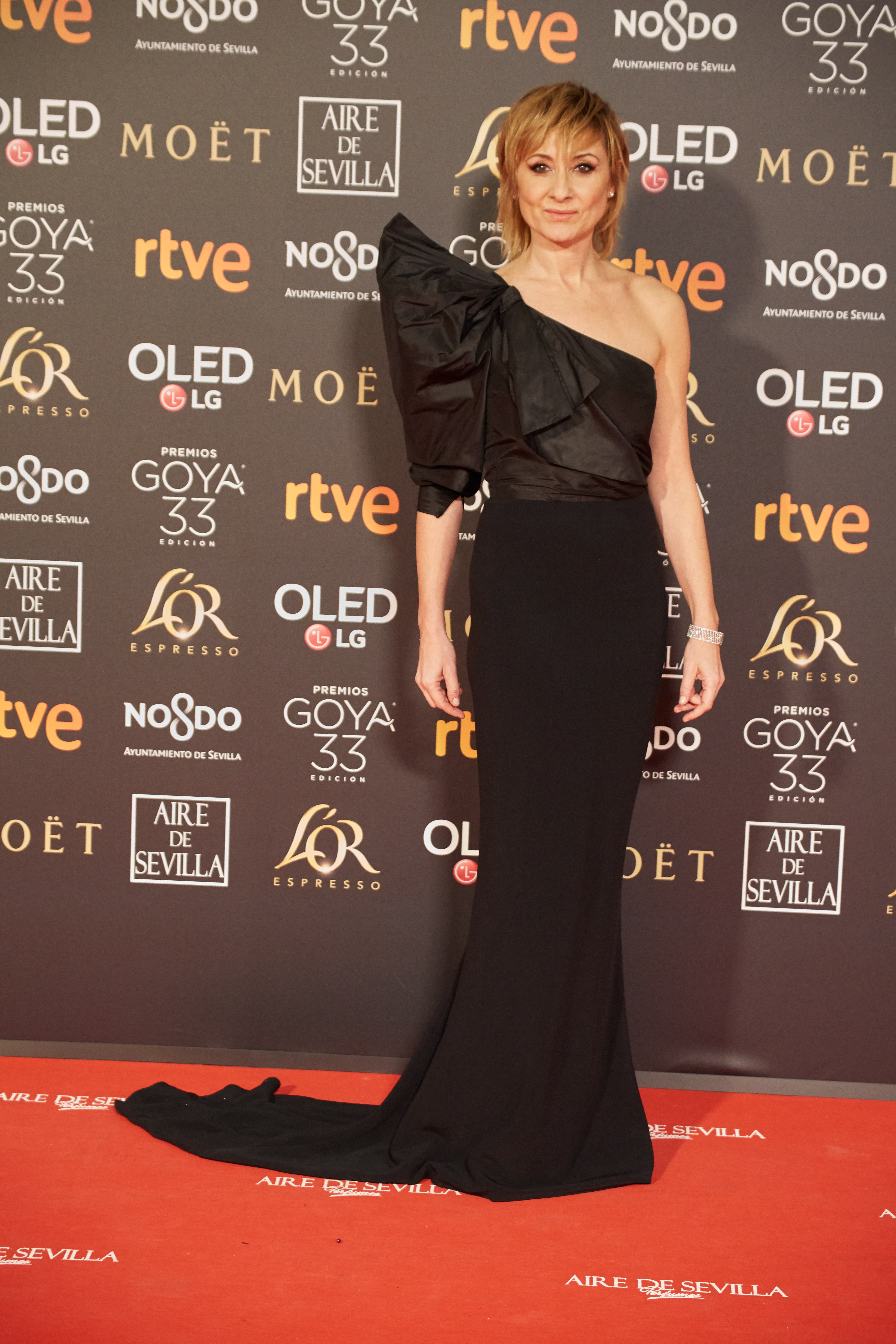 Nathalie Poeza en la alfombra roja de los Premios Goya celebrados en Sevilla en Febrero 2019